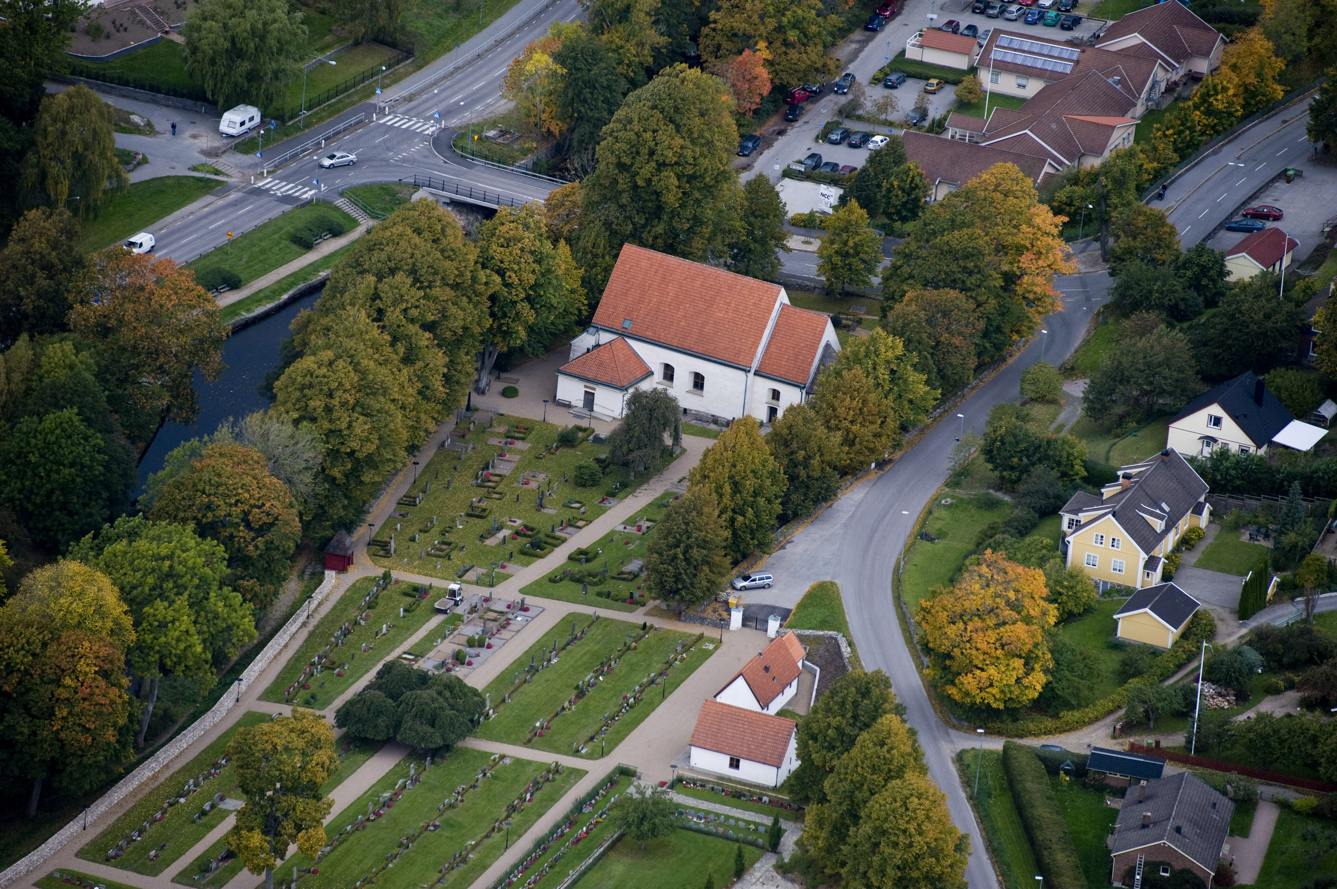 Nättraby kyrka från luften